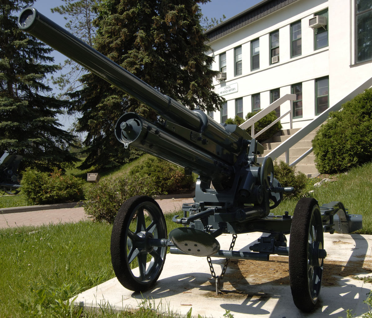 Cannone da 47/32 Mod.39.